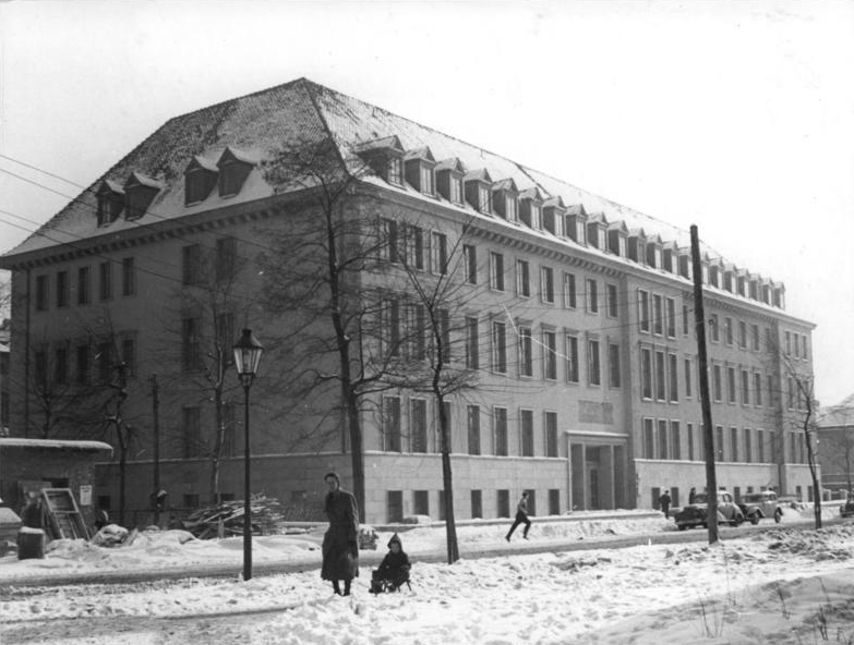 Zentralbild-Biscan Bn-Qu 23.2.56 Landesfrauenklinik in Magdeburg wieder aufgebaut Kurz vor dem Ende des zweiten Weltkrieges wurde die Landesfrauenklinik in Magdeburg von anglo-amerikanischen Bomben zerstört. Während des ersten Fünfjahrplans wurde mit dem Wiederaufbau begonnen. Am 28.2.56 konnte die baulich erweiterte wiedererstandene Klinik eingeweiht und der Bevölkerung übergeben werden. Die neue Landesfrauenklinik gehört zu der neugegründeten Medizinischen Akademie, der auch die Medizinische Fachschule angeschlossen ist. UBz. Blick auf die neuerbaute Landesfrauenklinik.